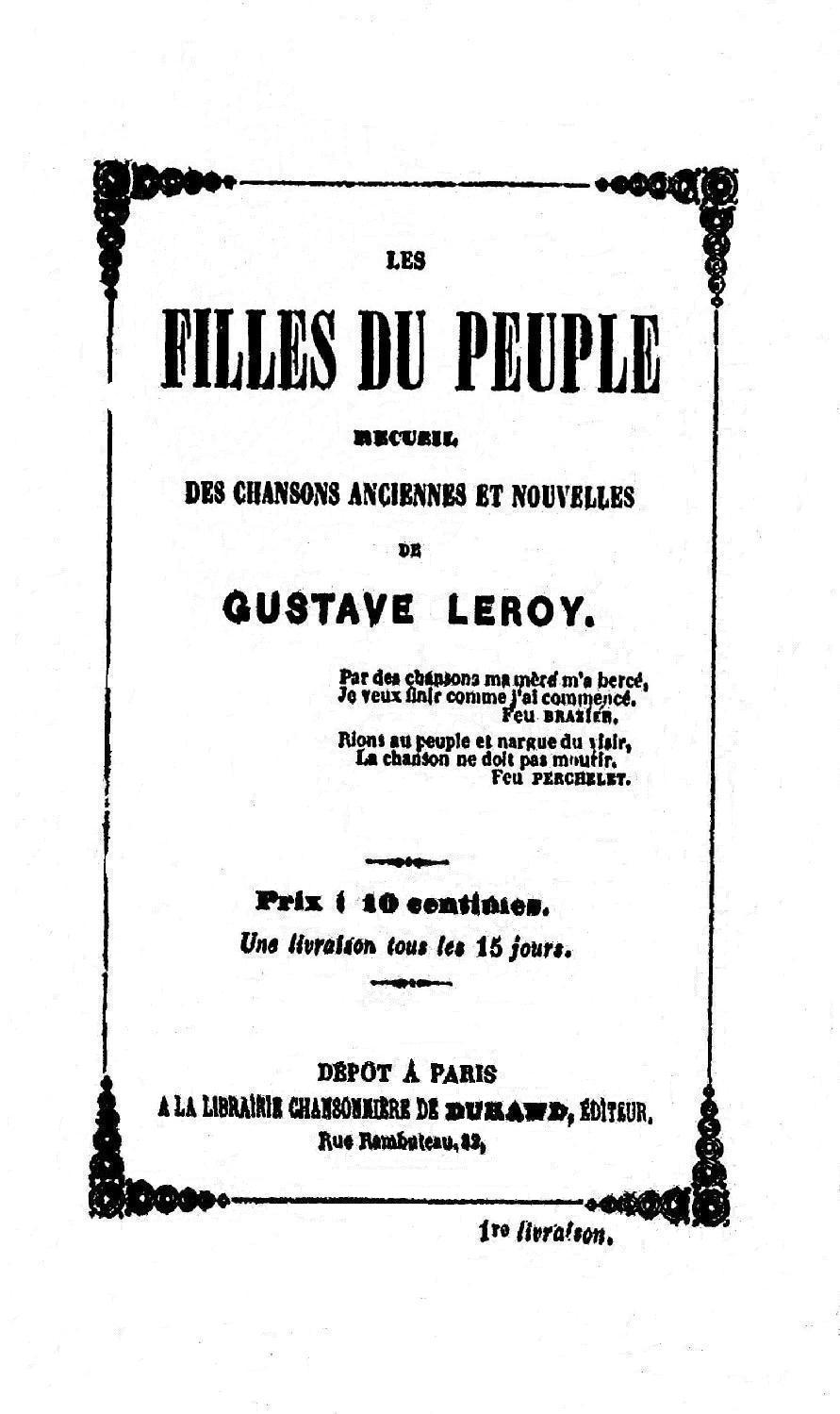 Couverture d'un recueil de chansons du goguettier parisien Gustave Leroy.